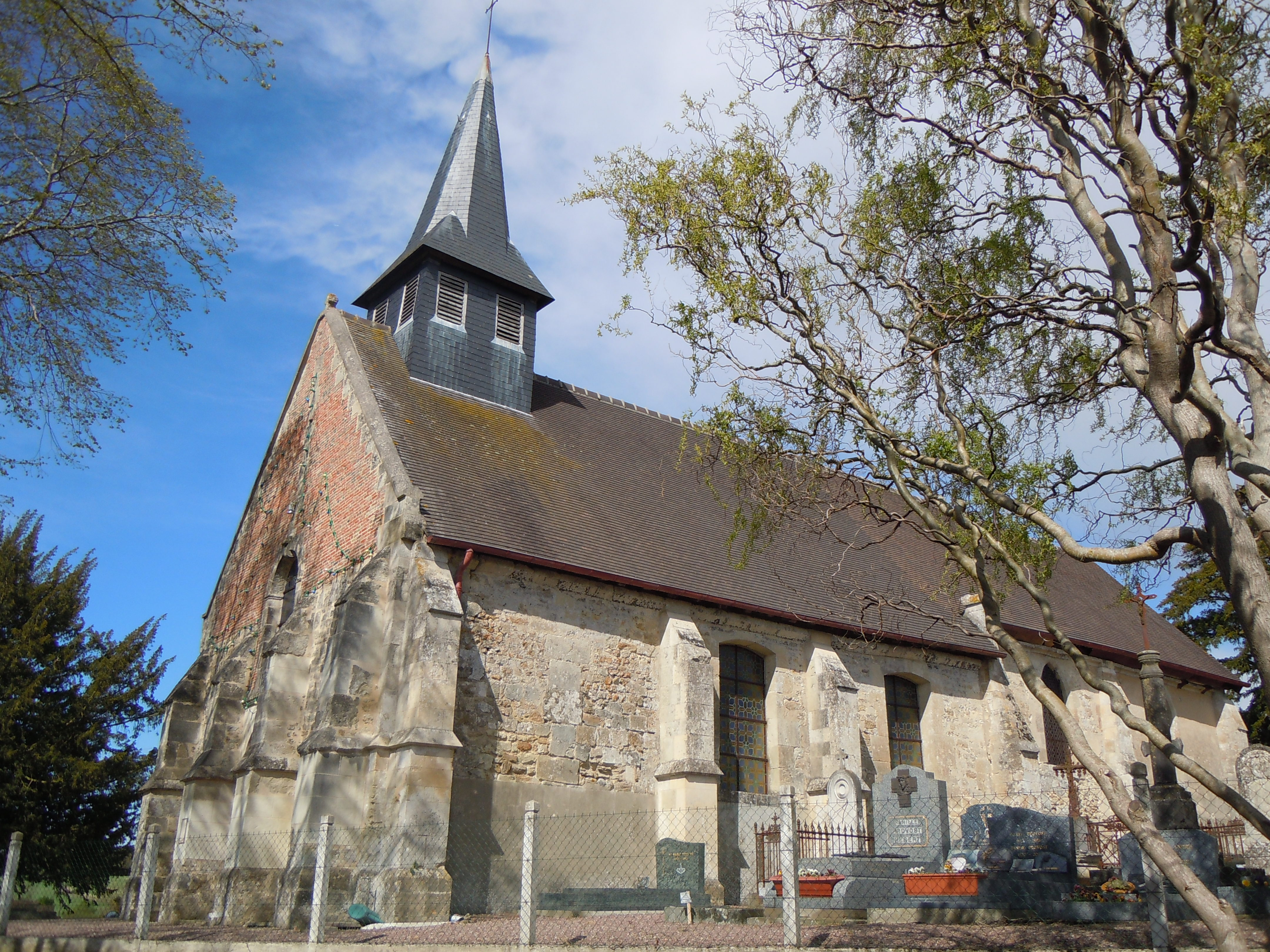 Saint-Leger Dubosq - Eglise